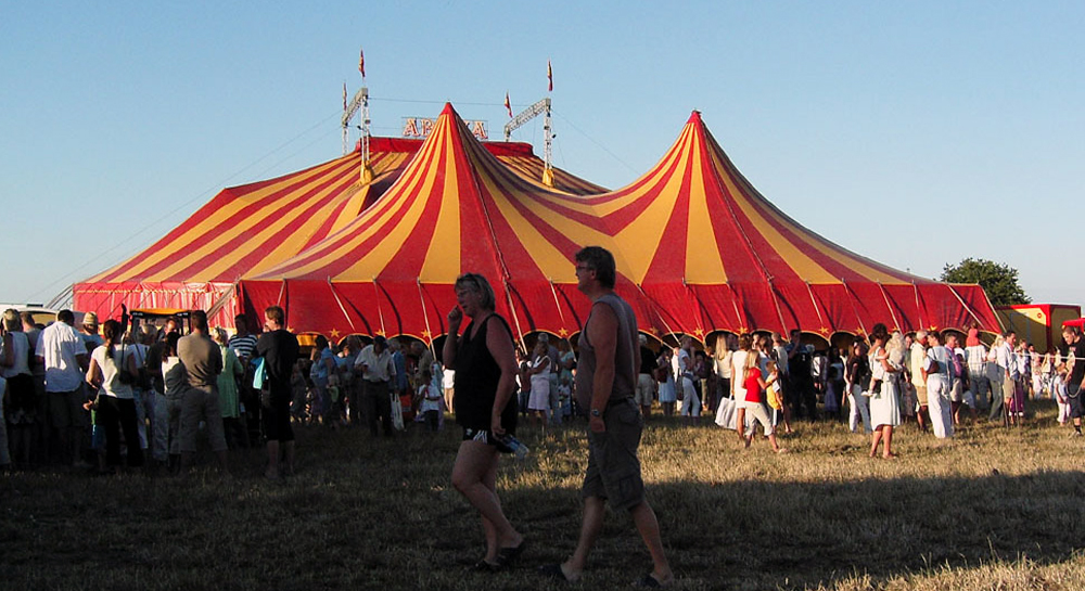 Cirkus Arena, Hornbæk 19-07-2006